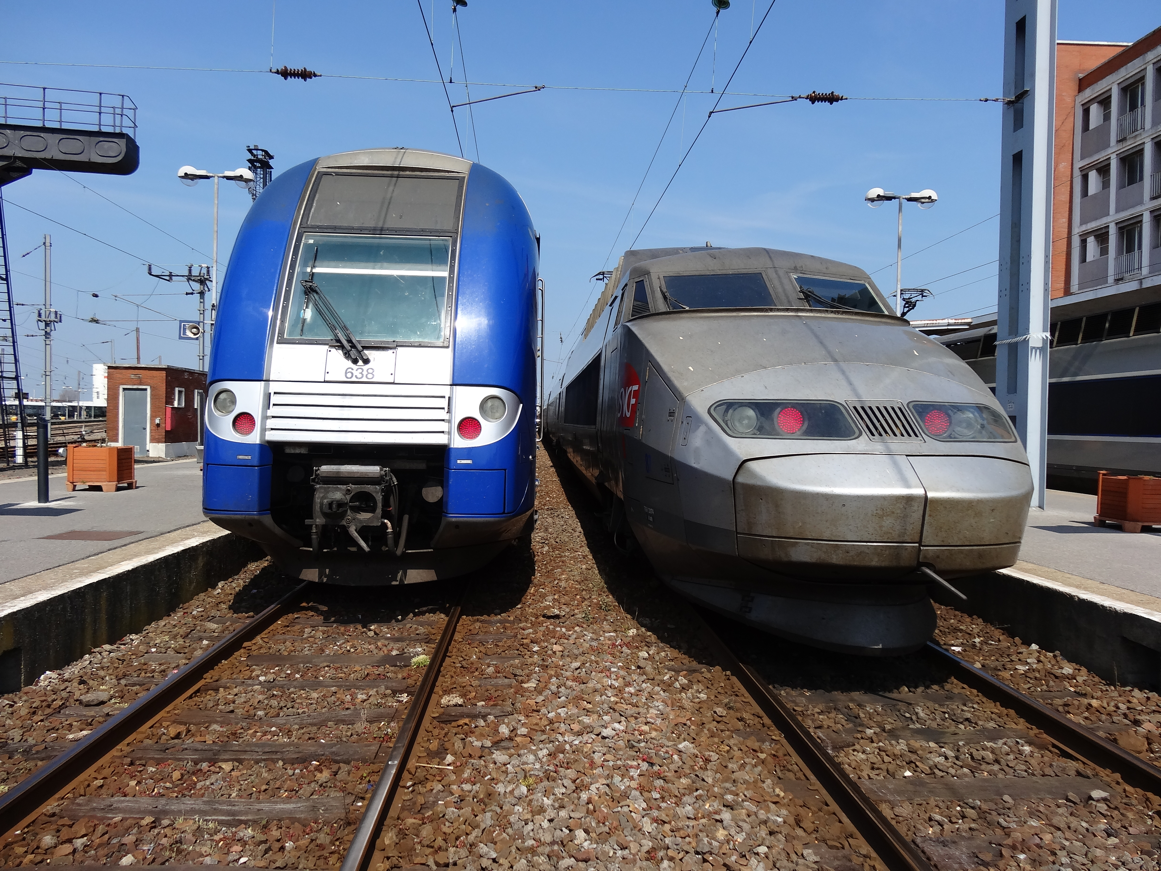 Gare de Dunkerque, Nord, Nord-Pas-de-Calais, France.